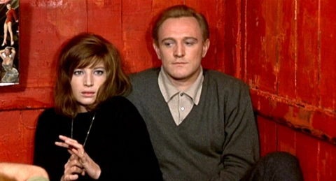 Monica Vitti és Richard Harris (Giuliana és Corrado), a Vörös sivatag c. olasz-francia filmben, rendezte Michelangelo Antonioni, 1964